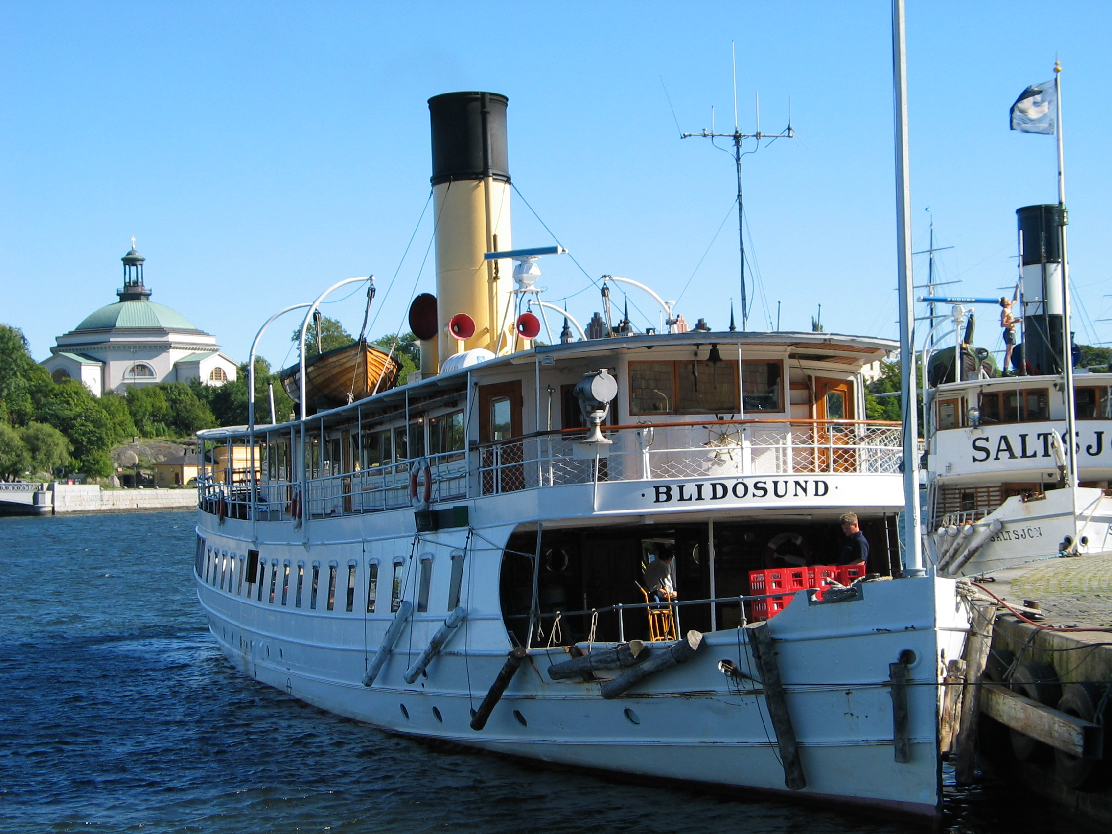 S/S Blidösund, a ship in Stockholm, Sweden.